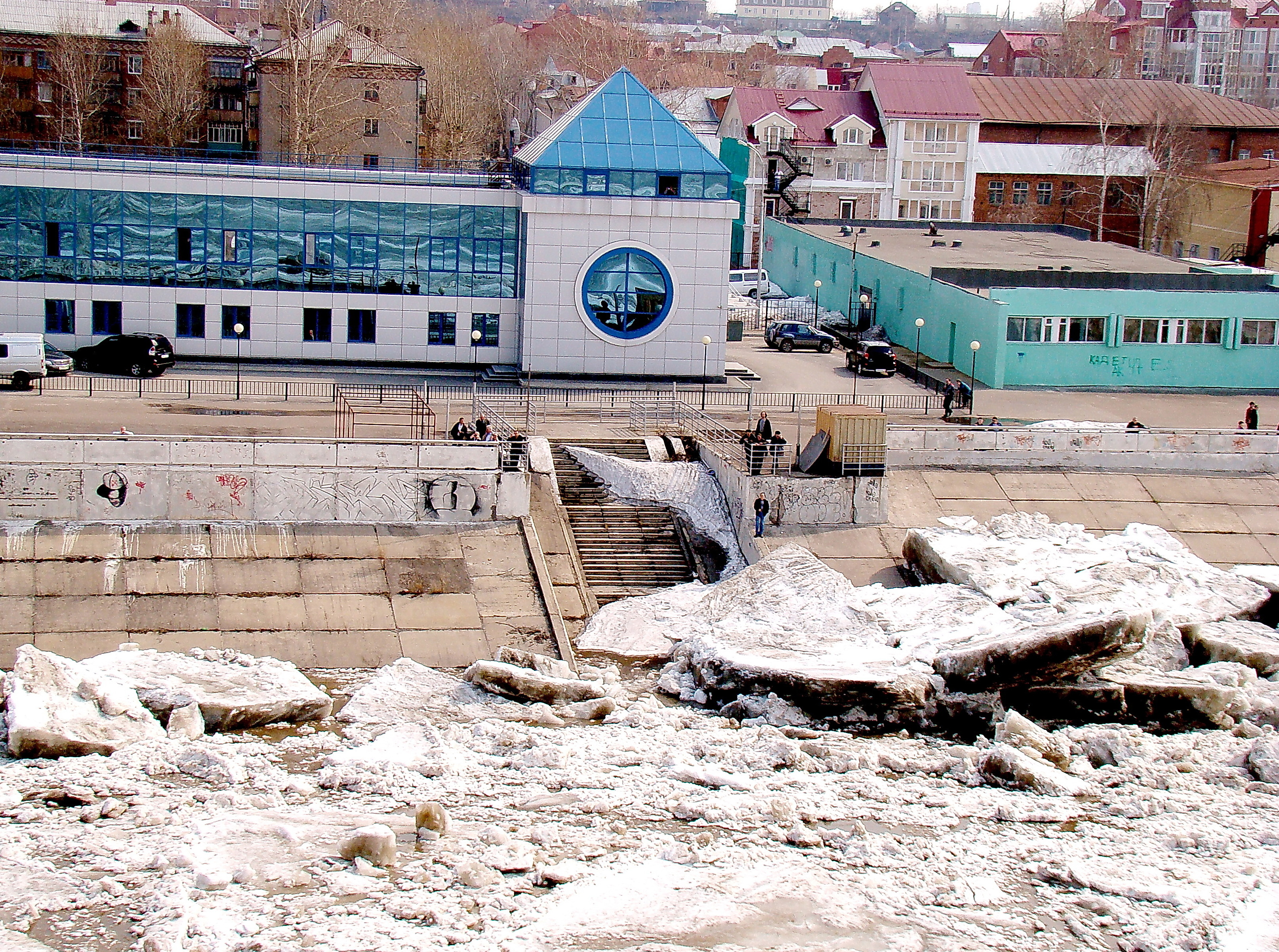 Начало ледохода в черте города Томска. В береговой зоне начинается торошение льда, в русле лед почти неподвижен. 29 апреля 2010 г. Фото А. Н. Рудого. Собственное фото, не публиковалось